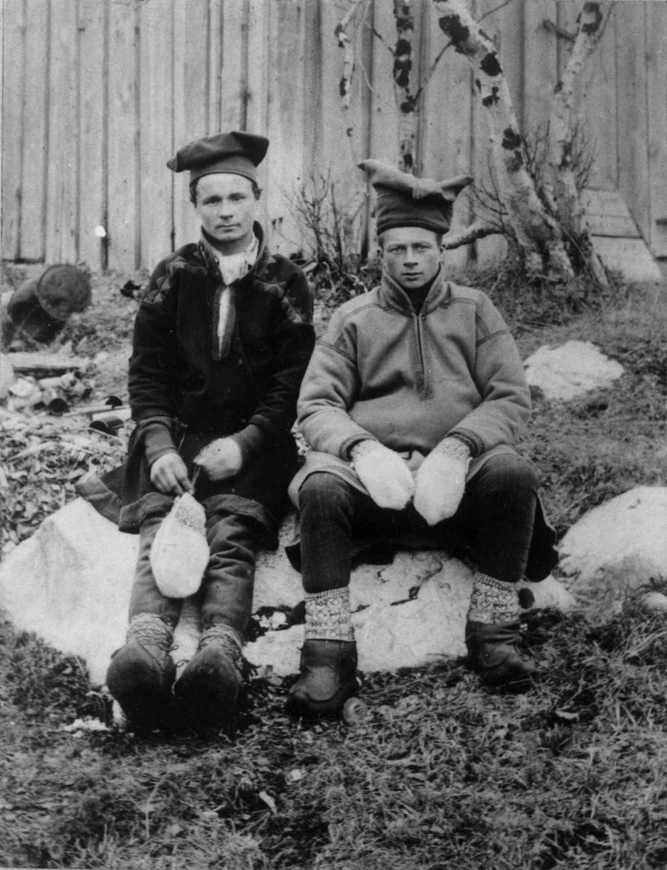 Sydpolfarerne Ole Johannes Must og Per John Savio, ant. Kirkenes, Sør-Varanger, Finnmark, 1898